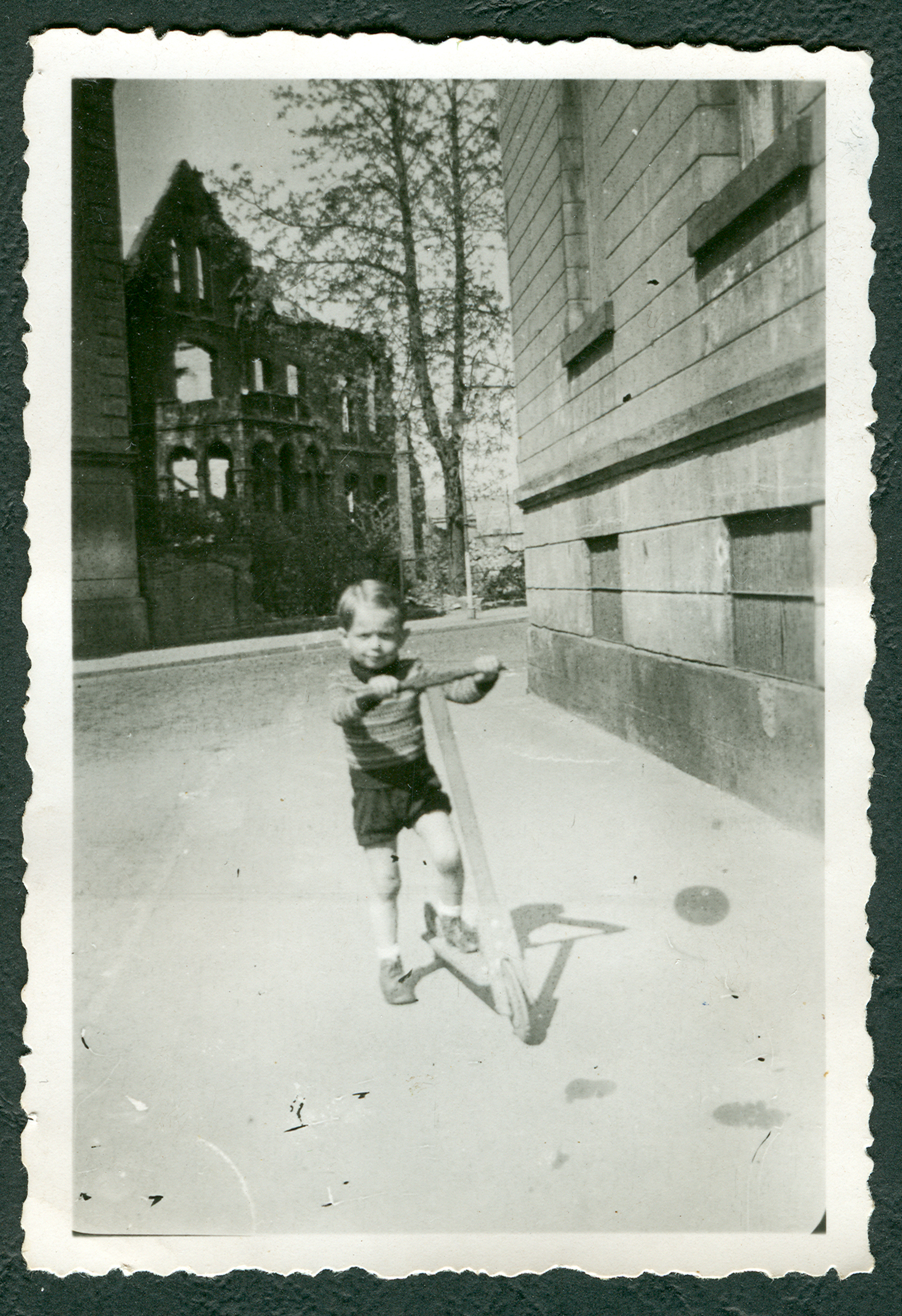 Um 1945: ehemalige Bebauung gegenüber der Villa Rosa, Glockseestraße 1. Im Hintergrund ist die Fassade eines Gebäude zu sehen, das während der Luftangriffe auf Hannover im Zweiten Weltkrieg zerstört wurde. Links daneben steht eine aufwendig verzierte ehemalige Verwaltungs-/Direktoren-Villa, die bis zum Bau des Ihmezentrums genutzt wurde. Heute befindet sich dort das Peter-Fechter-Ufer und die Auffahrt zur Ida-Arenhold-Brücke.